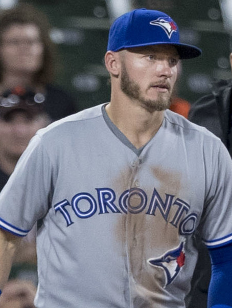 Blue Jays at Orioles 8/31/17